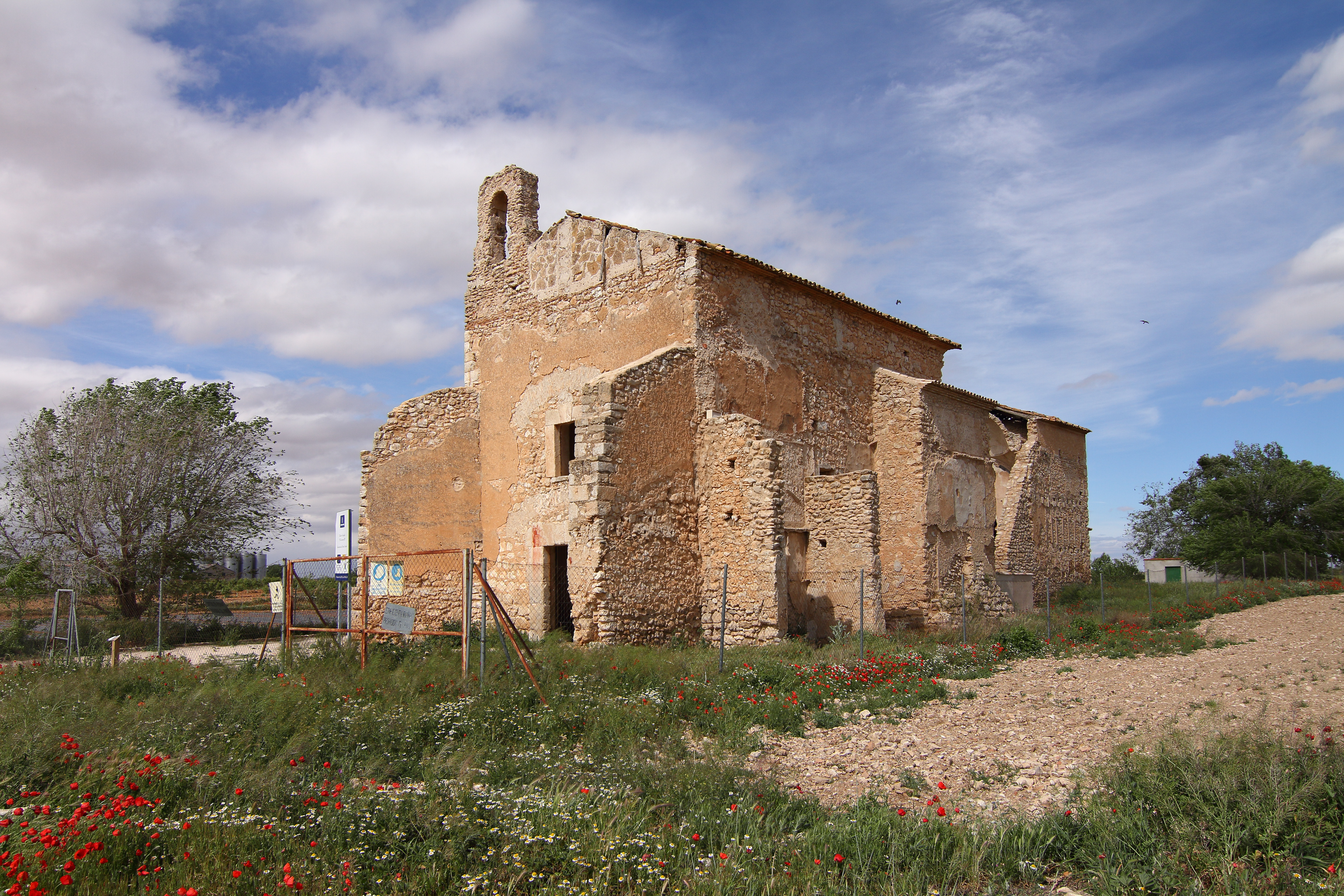 Mahora, ruinas del convento, 02